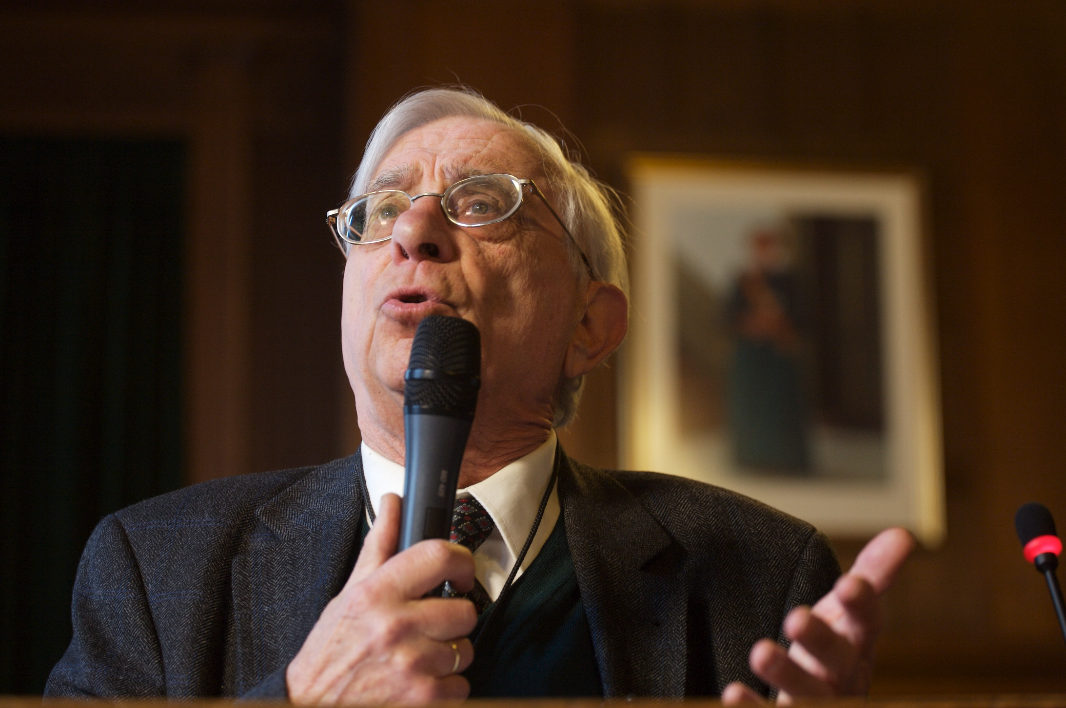 Eminent historicus Prof. Dr. Hermann von der Dunk legt het uit in een lezing over een figuur waaraan Utrecht liever niet herinnerd wil worden: Anton Mussert, oprichter van de Nationaal-Socialistische Beweging (NSB) in 1931. Na tijdens de Tweede Wereldoorlog in Utrecht te hebben gewoond, werd hij in 1946 ter dood veroordeeld vanwege zijn rol in de bezetting. Von der Dunk toont het bredere verband van de radicalisering die eind jaren 30 van de vorige eeuw begon, en laat zien en horen hoe akelig actueel dit onderwerp eigenlijk nog is